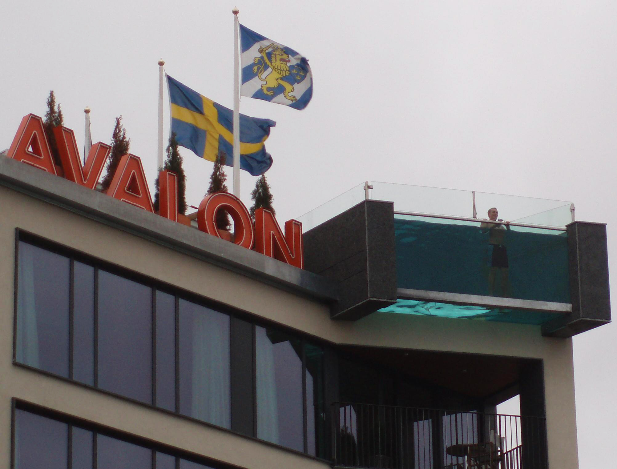 Piscine à ciel ouvert sur le toit de l’hôtel Avalon, à Göteborg, Suède.